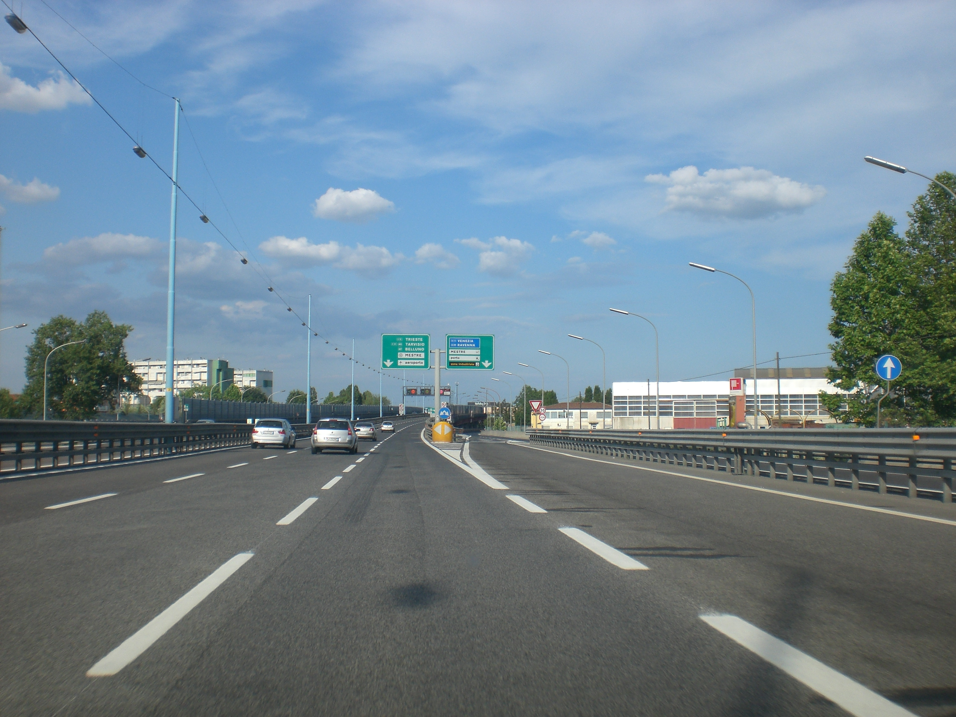 Svincolo Romea dell'A57 direzione est